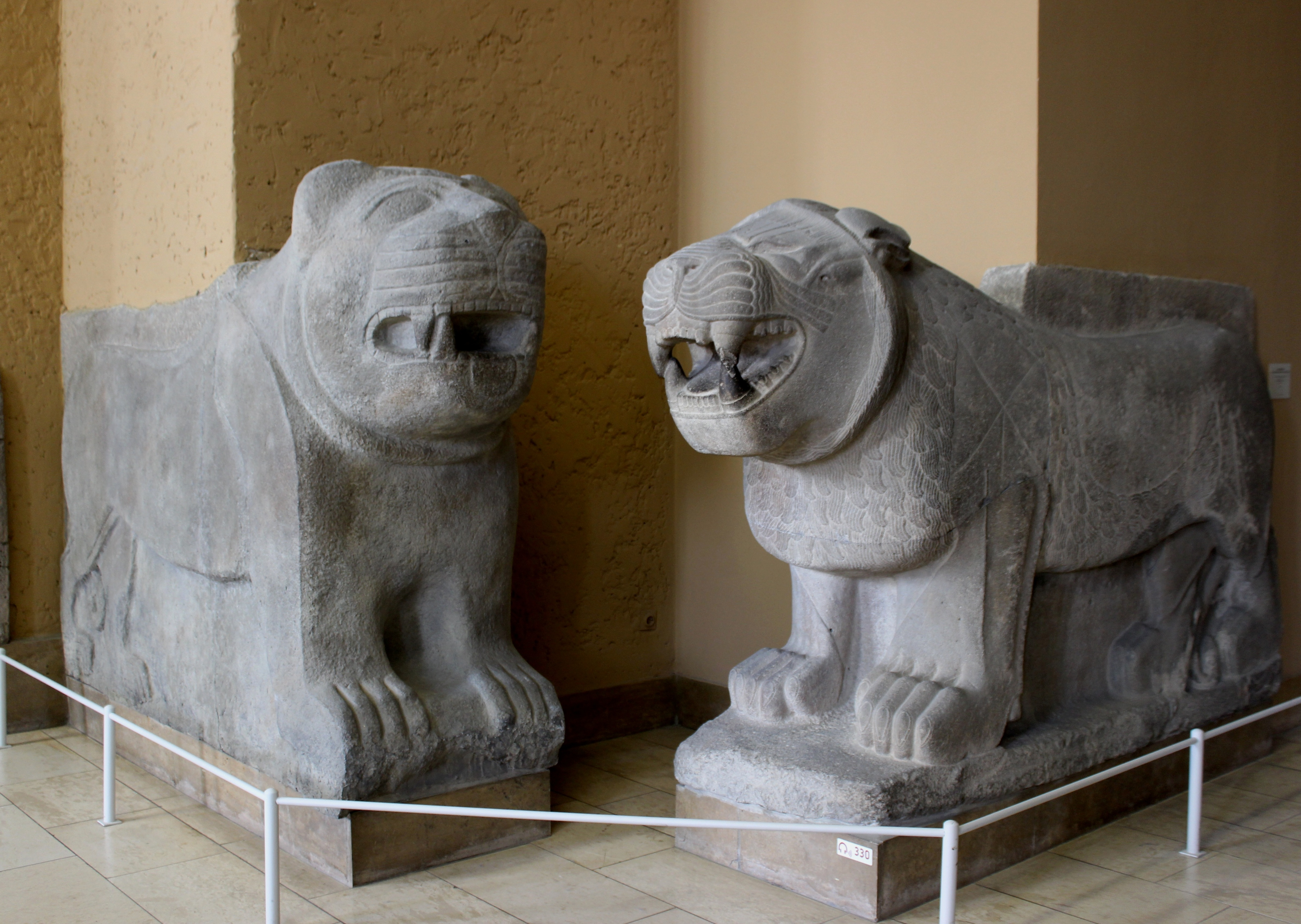 Berlín, Vorderasiatisches Museum. Leones de Sam'al.